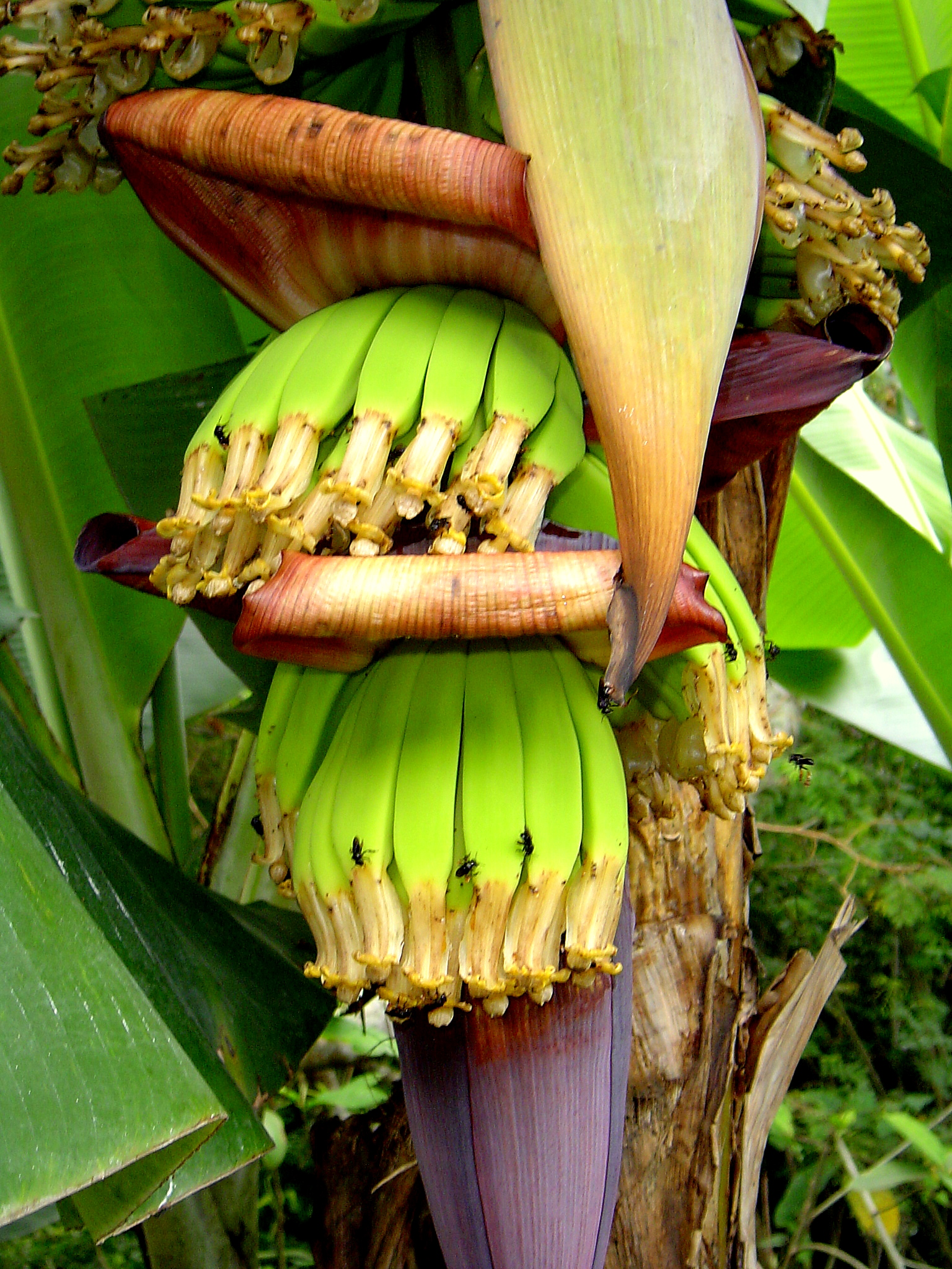 Musaceae sp.Banane. Bananenblüte mit den sich reihenweise entwickelnden Früchten.An den Fruchtblüten laben sich schwarze Bienen.